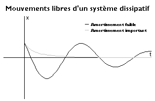 Mouvements libres dissipatif, Image personnelle.